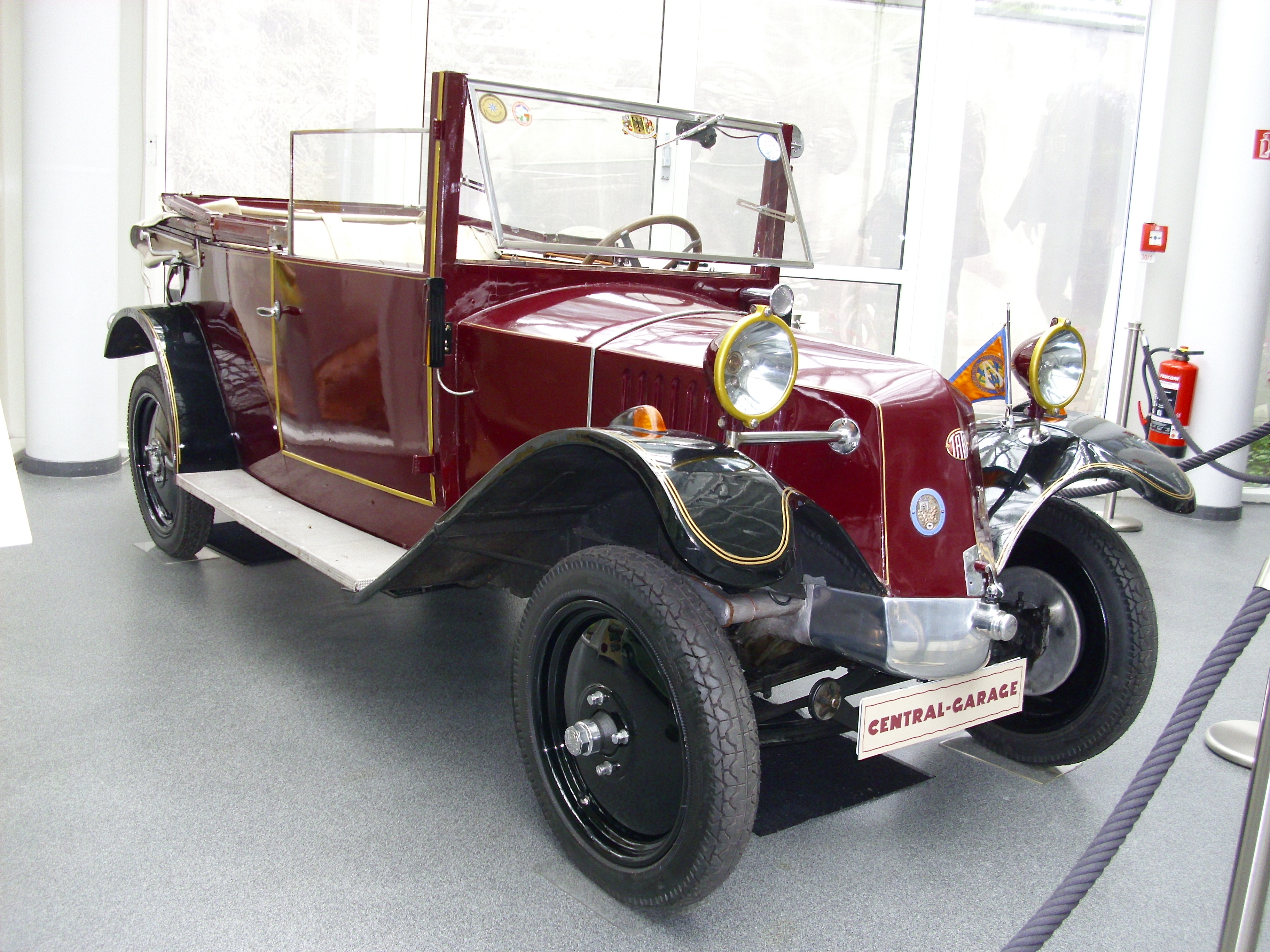 Tatra 4/14 PS von 1928, hergestellt durch die Deutsche Licenz Tatra